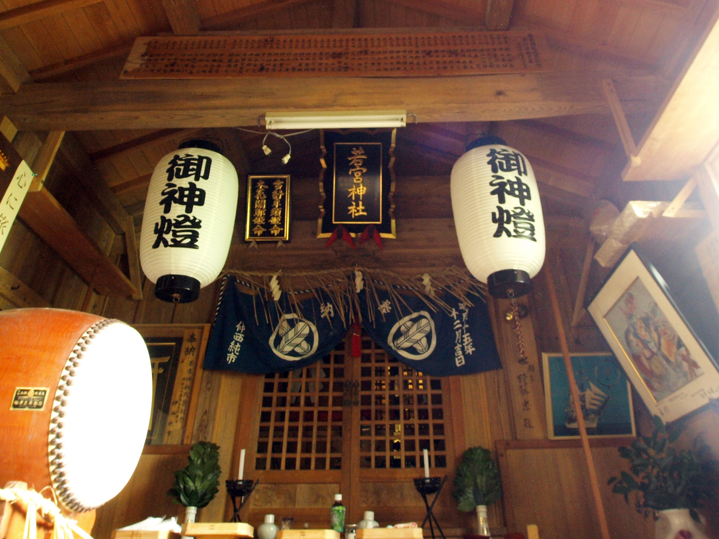 桜谷神社。左上の額には祭神・古計牟須姫命・木花開耶姫命の名が見える。